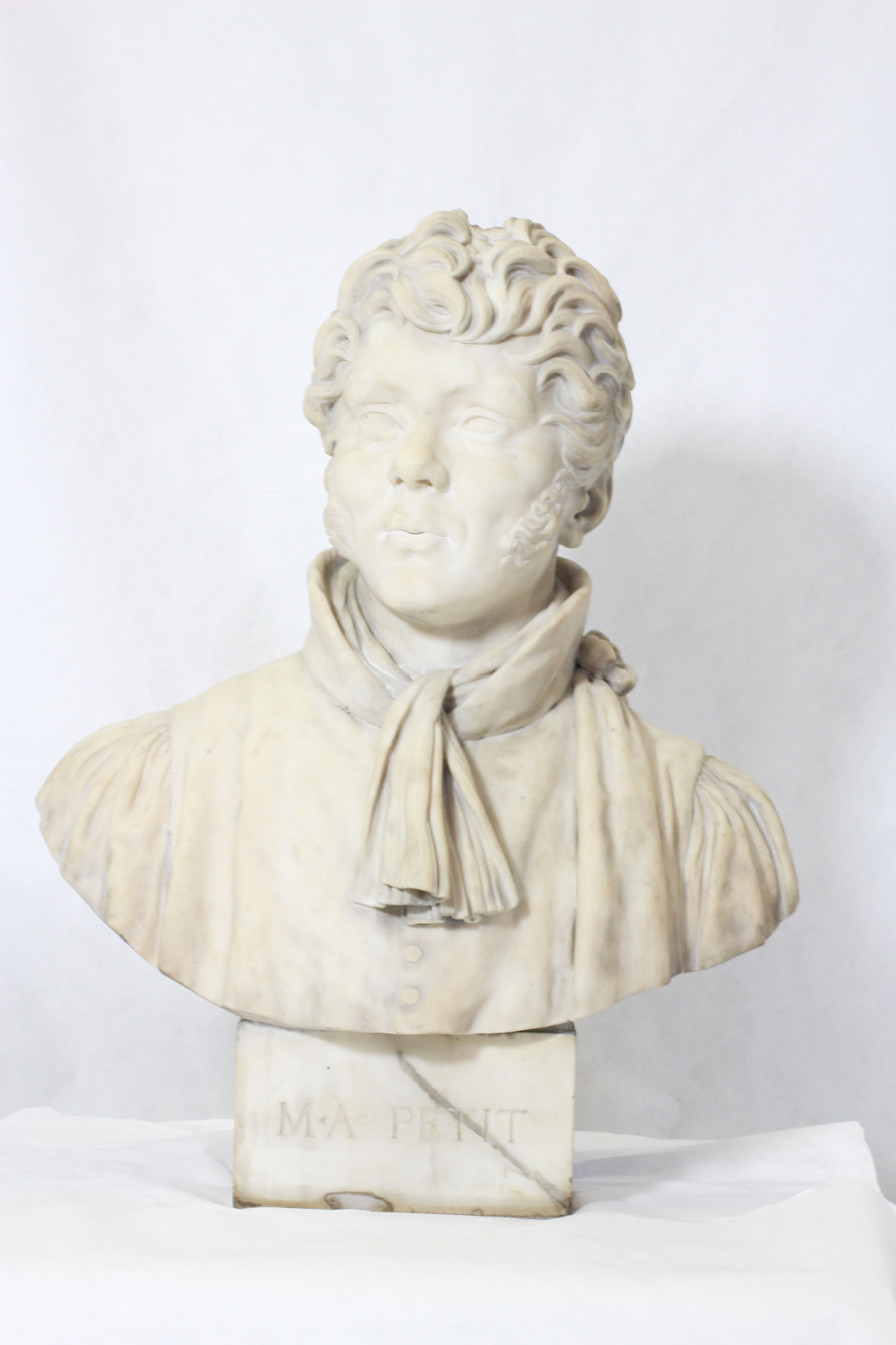 Photo de face du buste en marbre de Marc-Antoine Petit sculpté en 1825 par Legendre Héral.